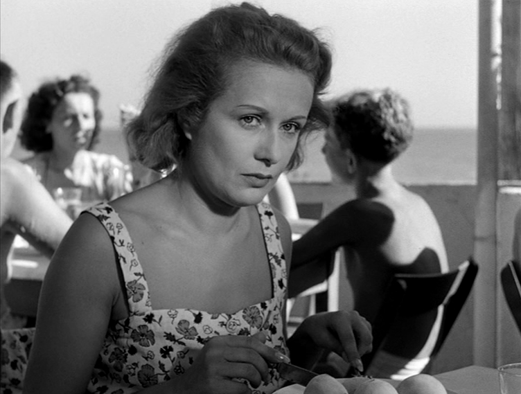 Screenshot del film Domenica d'agosto (1950) di Luciano Emmer.